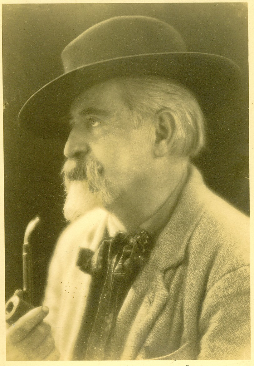 Photo représentant José Mange peintre